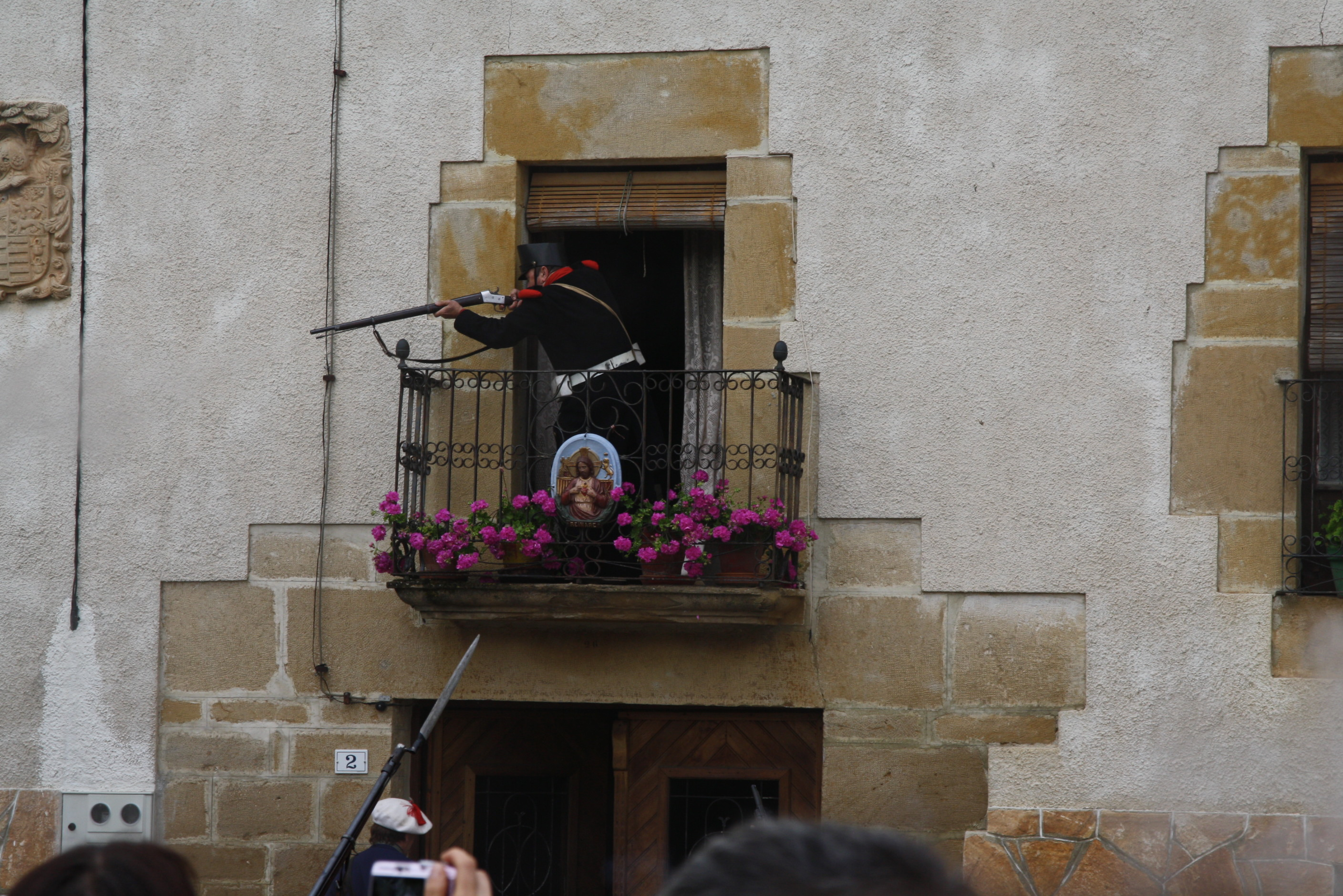 Teatralización "La Batalla de Lácar" Antzezpena